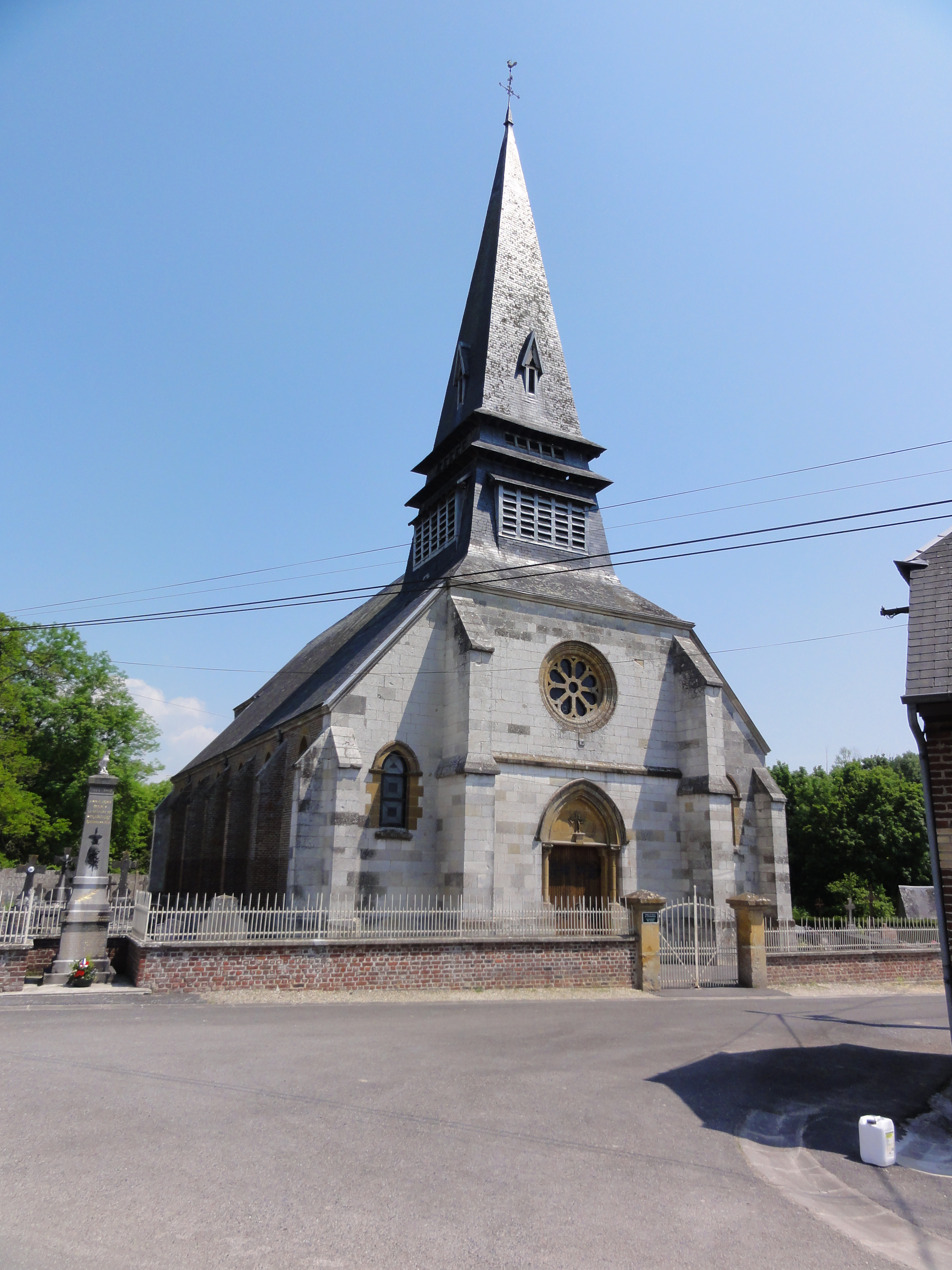 Séraincourt (Ardennes) Église